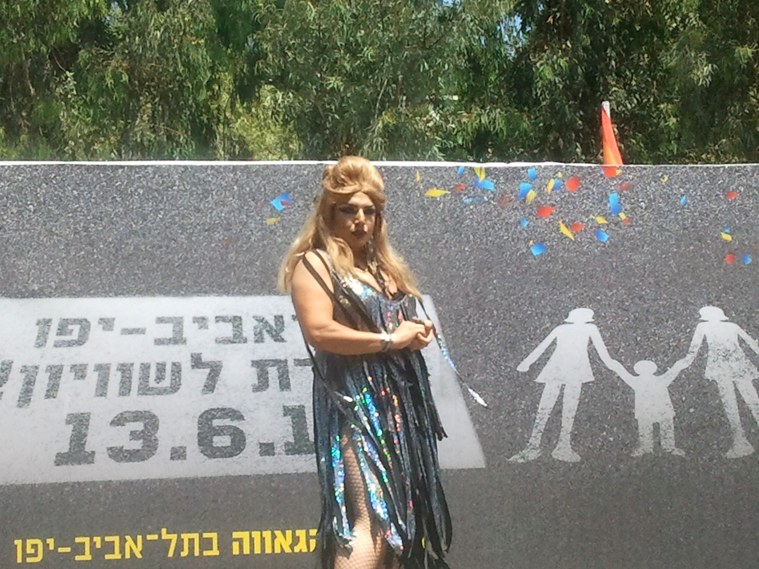 מופעים בגן מאיר ביום מצעד הגאווה, בחלק שקדם למצעד המופעים כללו מופעי דראג קווין